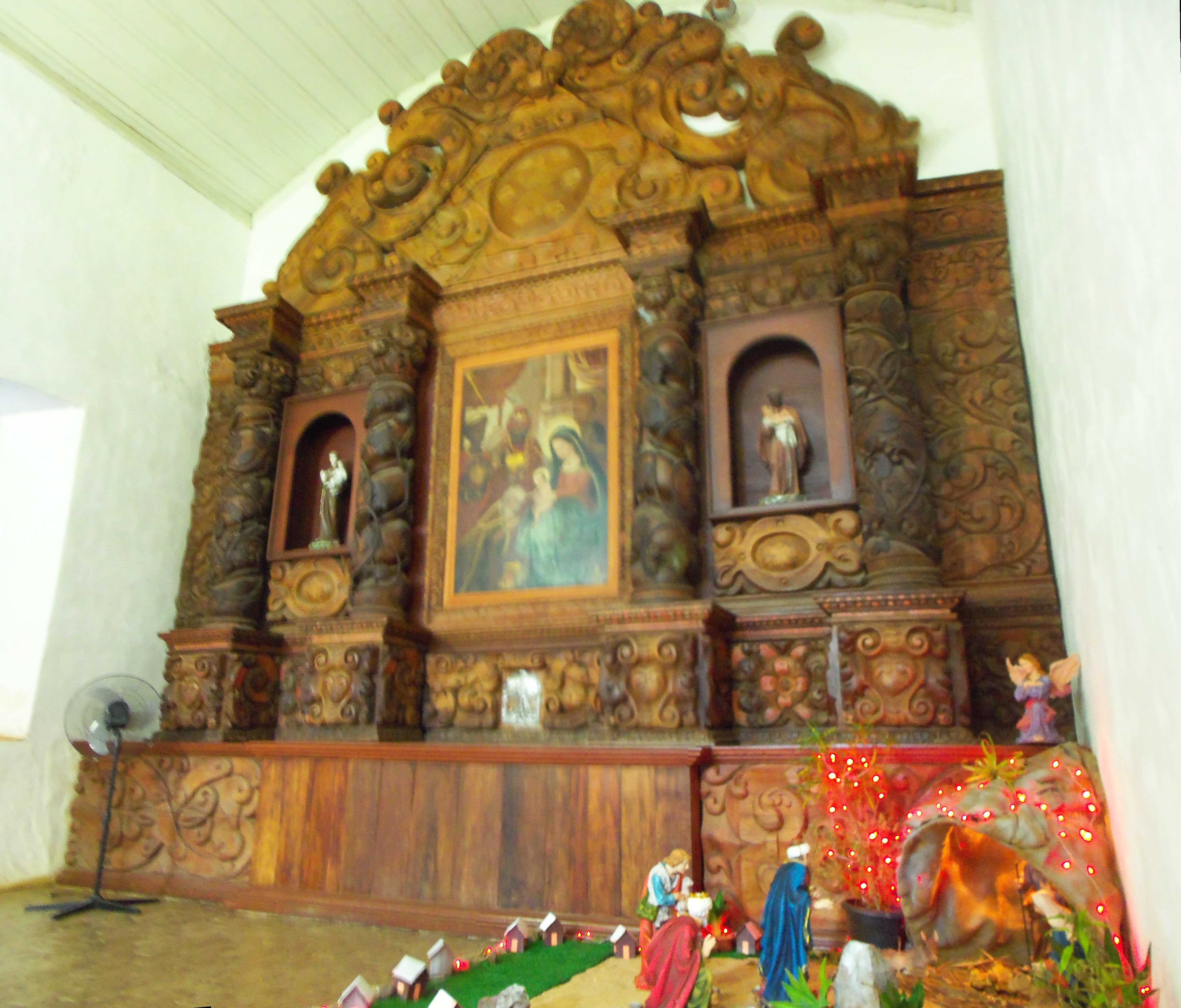 Altar da Igreja dos Reis Magos